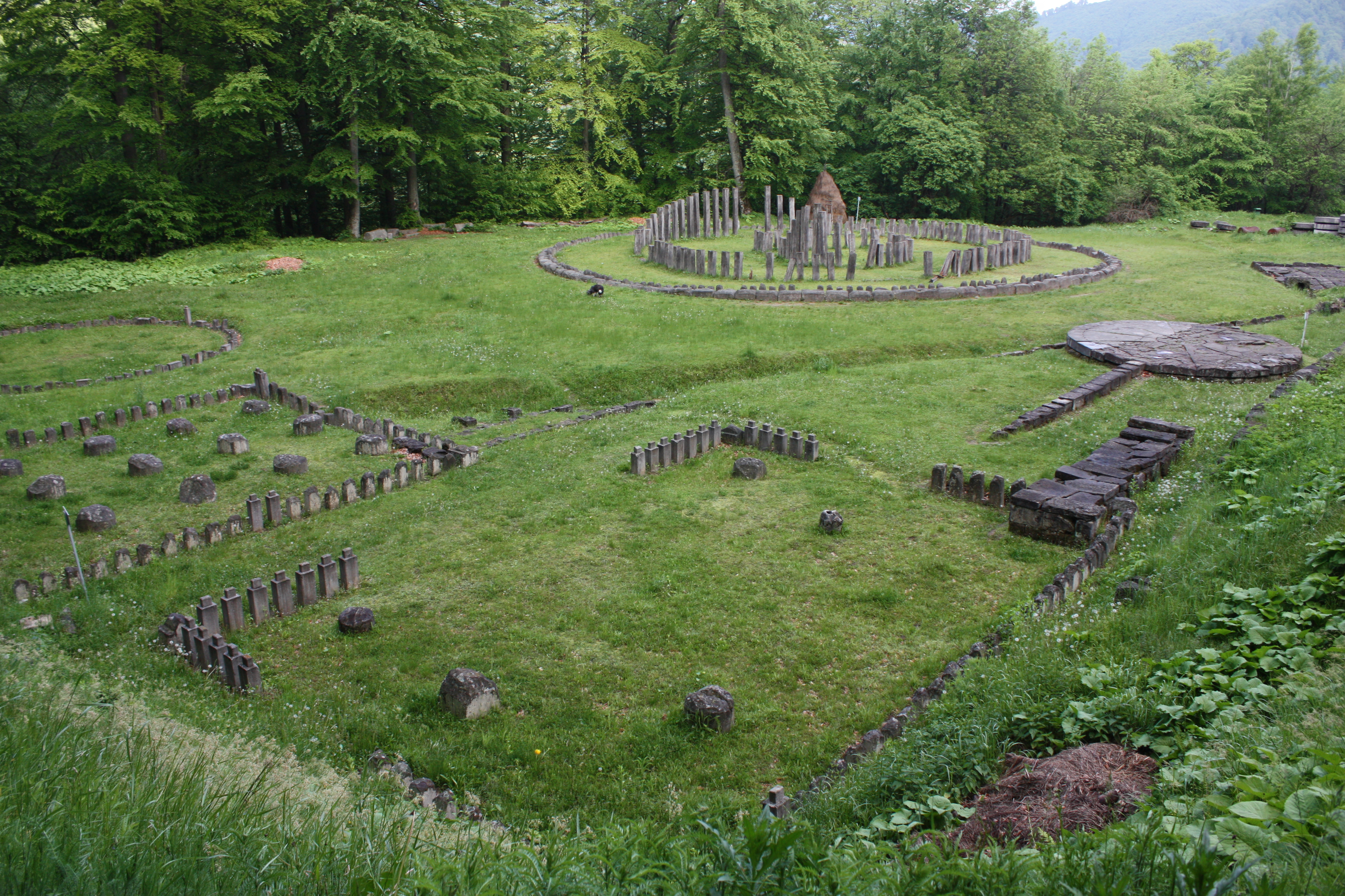 Helligdommene ved Sarmizegetusa Regia.